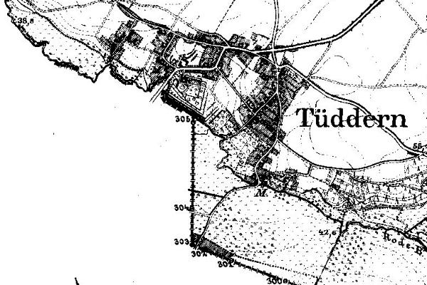 Neuaufnahme 1891 -1912